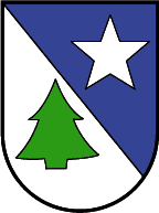 Blons, Vorarlberg: Im schräg geteilten Schild im oberen blauen Feld ein fünfzackiger silberner Walliserstern, im unteren silbernen Feld eine grüne Tanne in der Form einer alten Hausmarke. (Verleihung: 14. Oktober 1969)